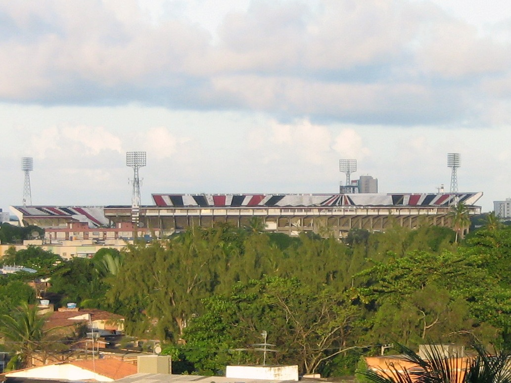 Stadium of Santa Cruz FC in Recife, Brazil. Taken from Alto do Zé do Pinho hill.